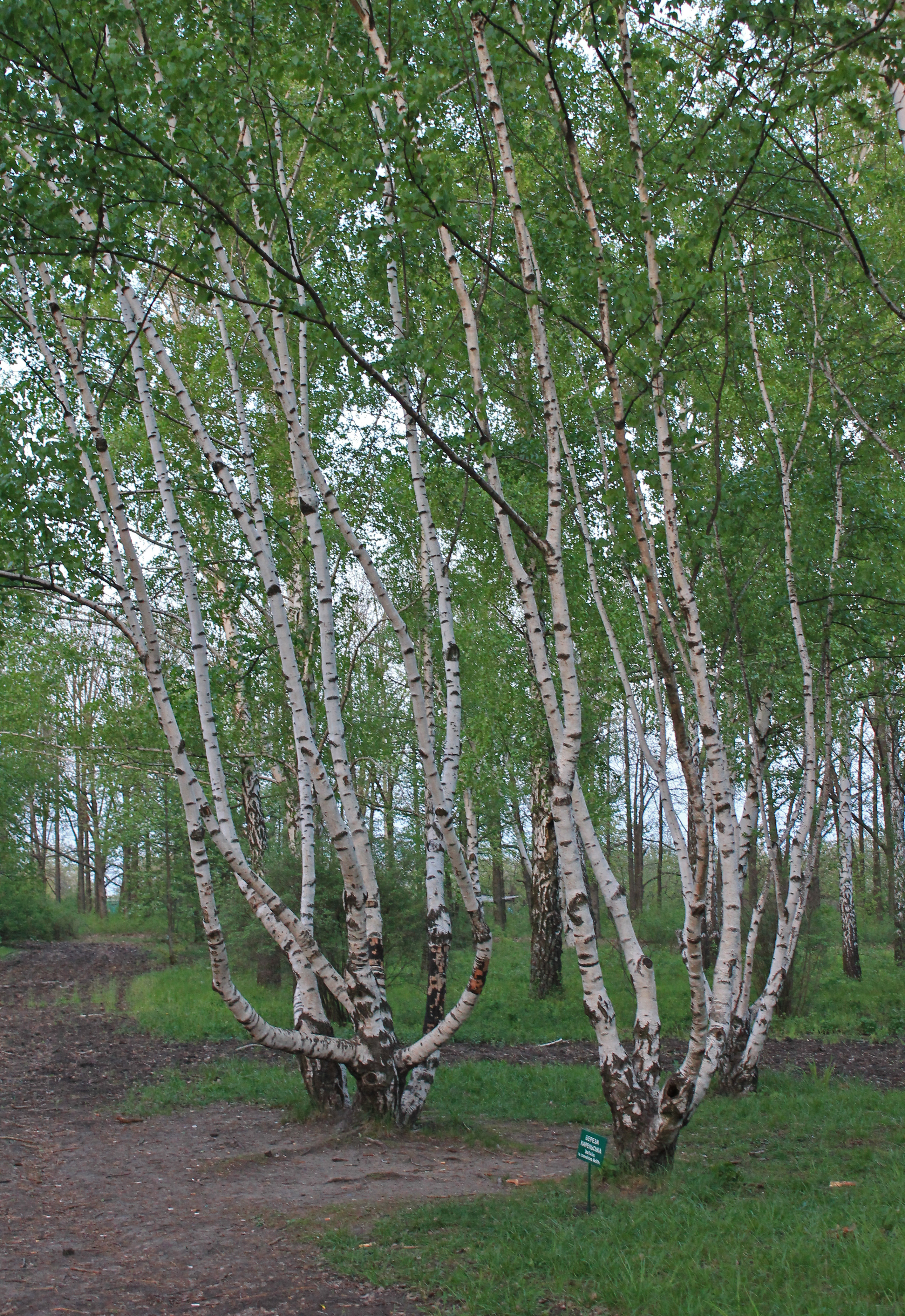 Дендрологічний парк Харківського національного аграрного університету ім. В. В. Докучаєва, с. Рогань, Харківський район.